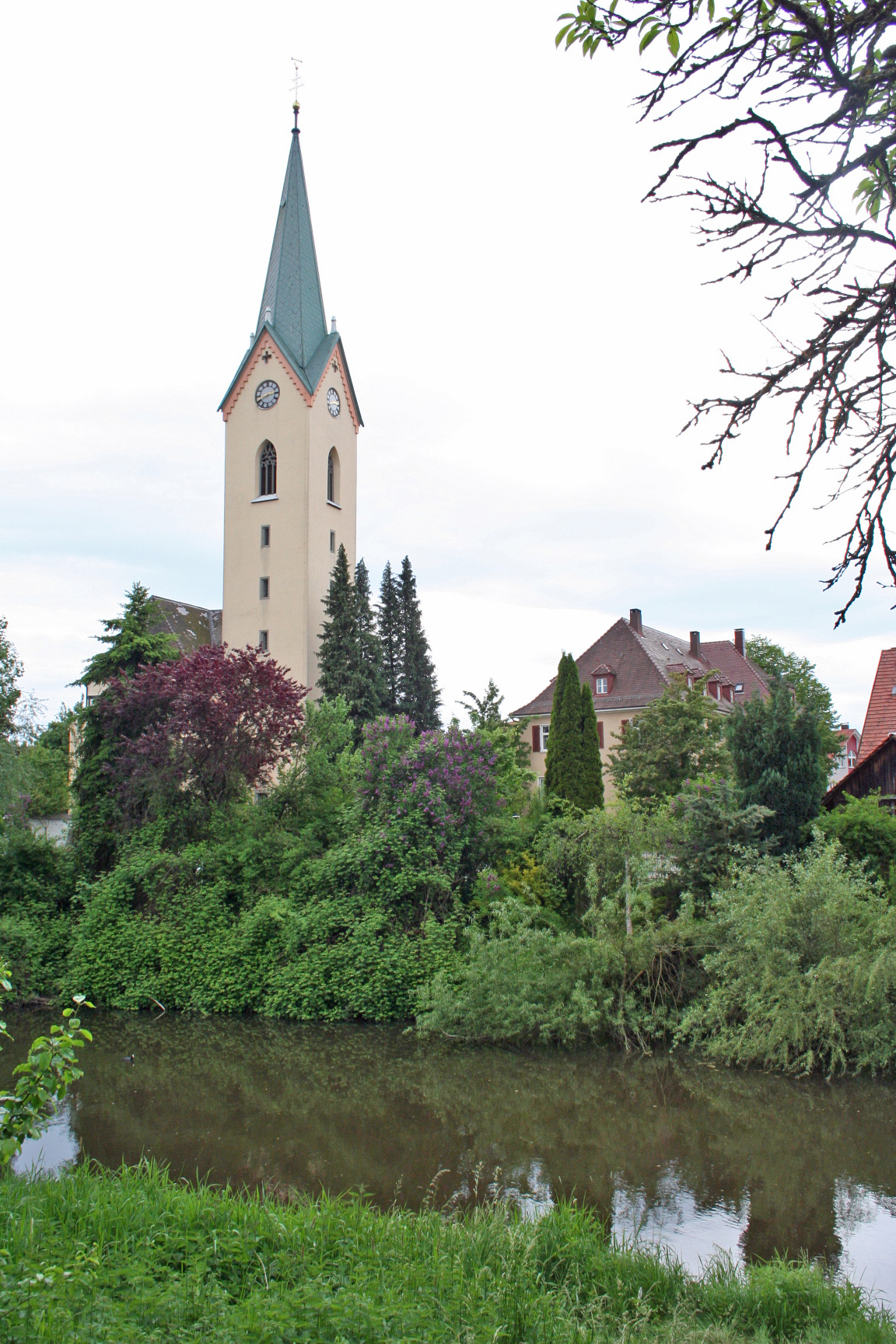 Katholischen Pfarrkirche "Unserer lieben Frau" (Turmhöhe: 66 Meter) in Eriskirch, mit dem Fluss Schussen.